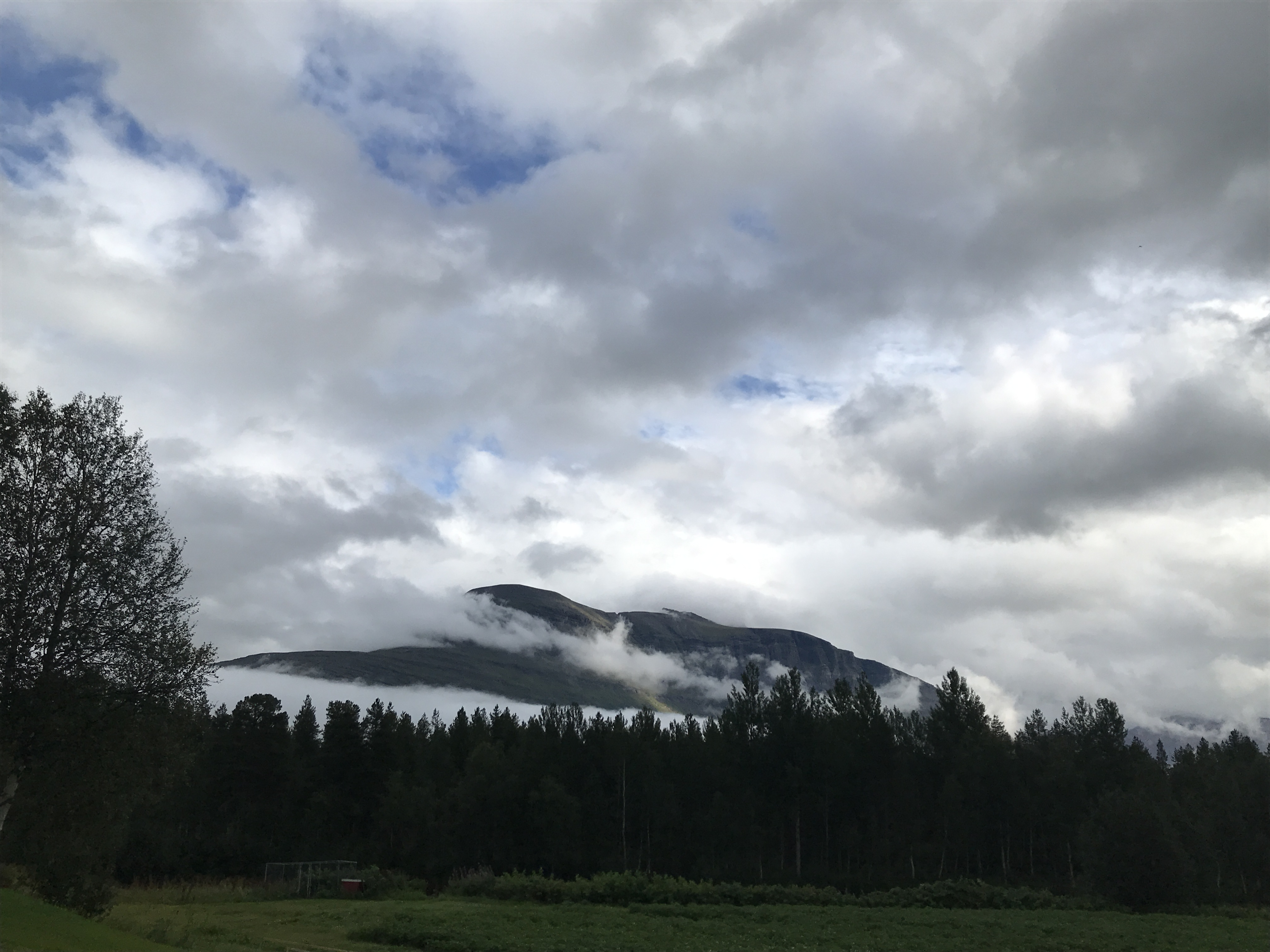 Rostafjellet, sett fra sør